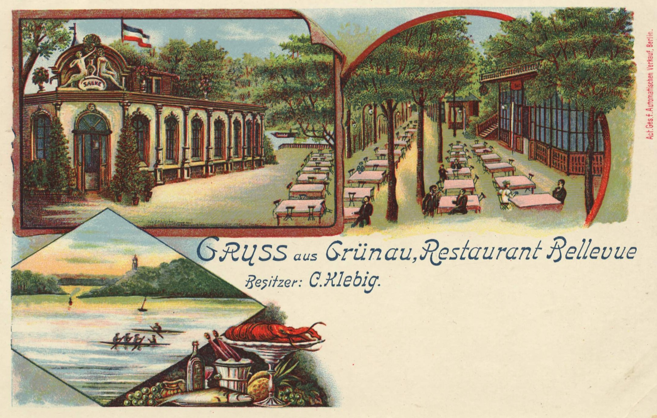 Restaurant Bellevue in Grünau, um 1900